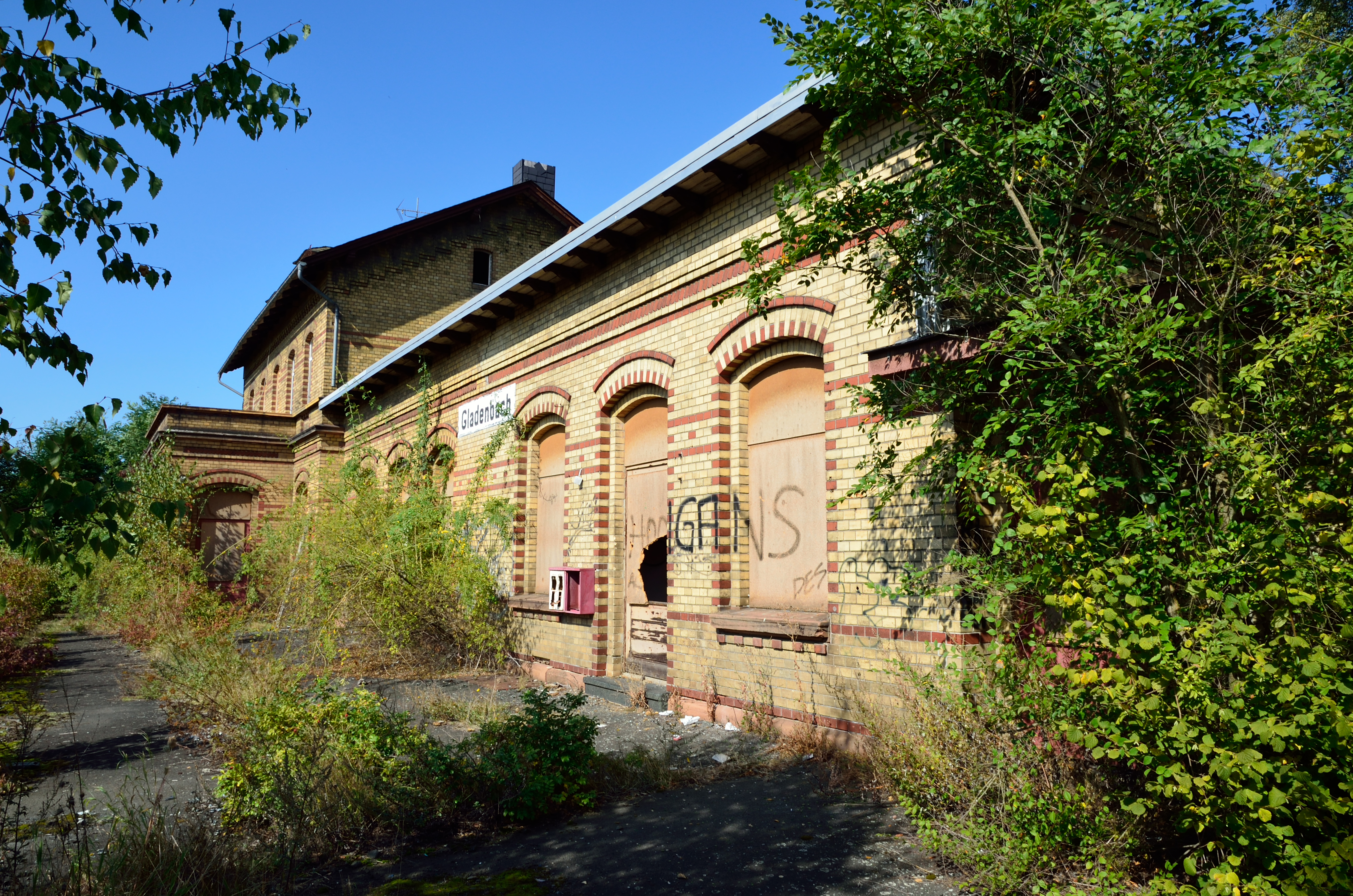 Der ehemalige Bahnhof Gladenbach, Bahnhofstraße 77